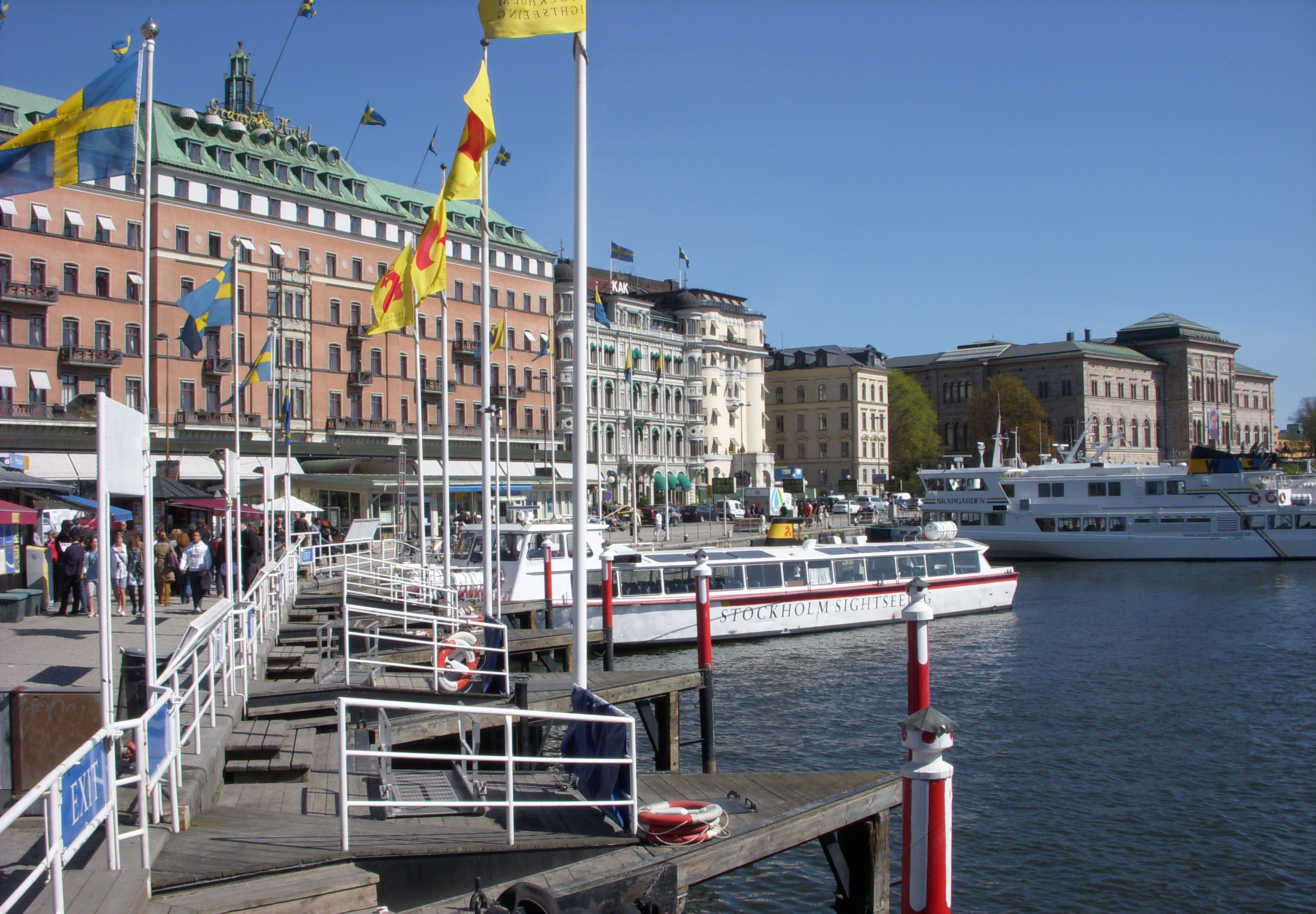 Blasieholmskajen med sightseeingbåtar i Stockholm